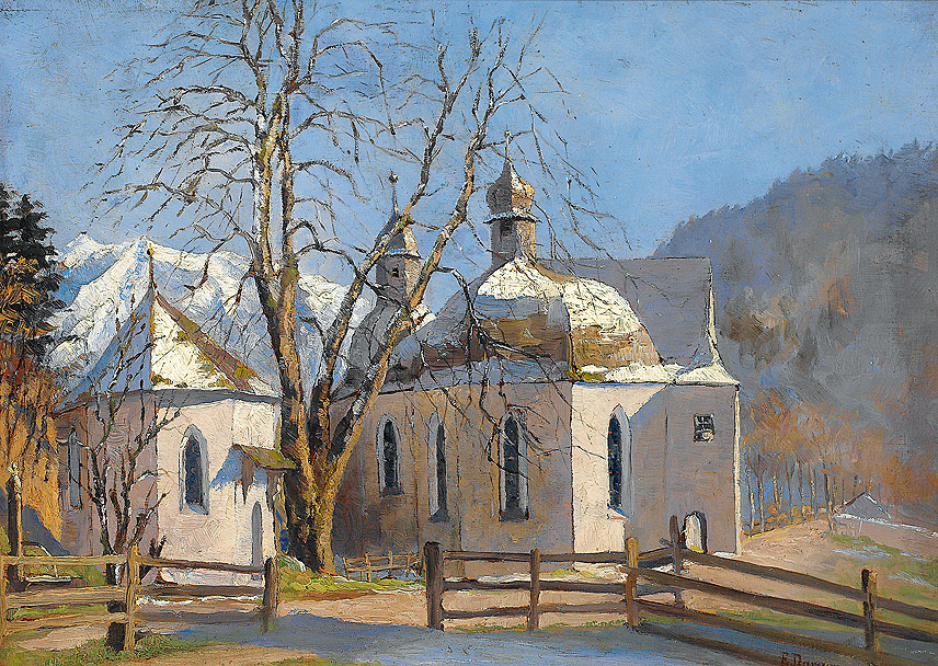 Lorettokapelle St. Maria in Oberstdorf